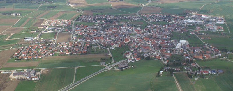 Aerial Photo of Nellingen (Alb), Baden-Württemberg, Germany